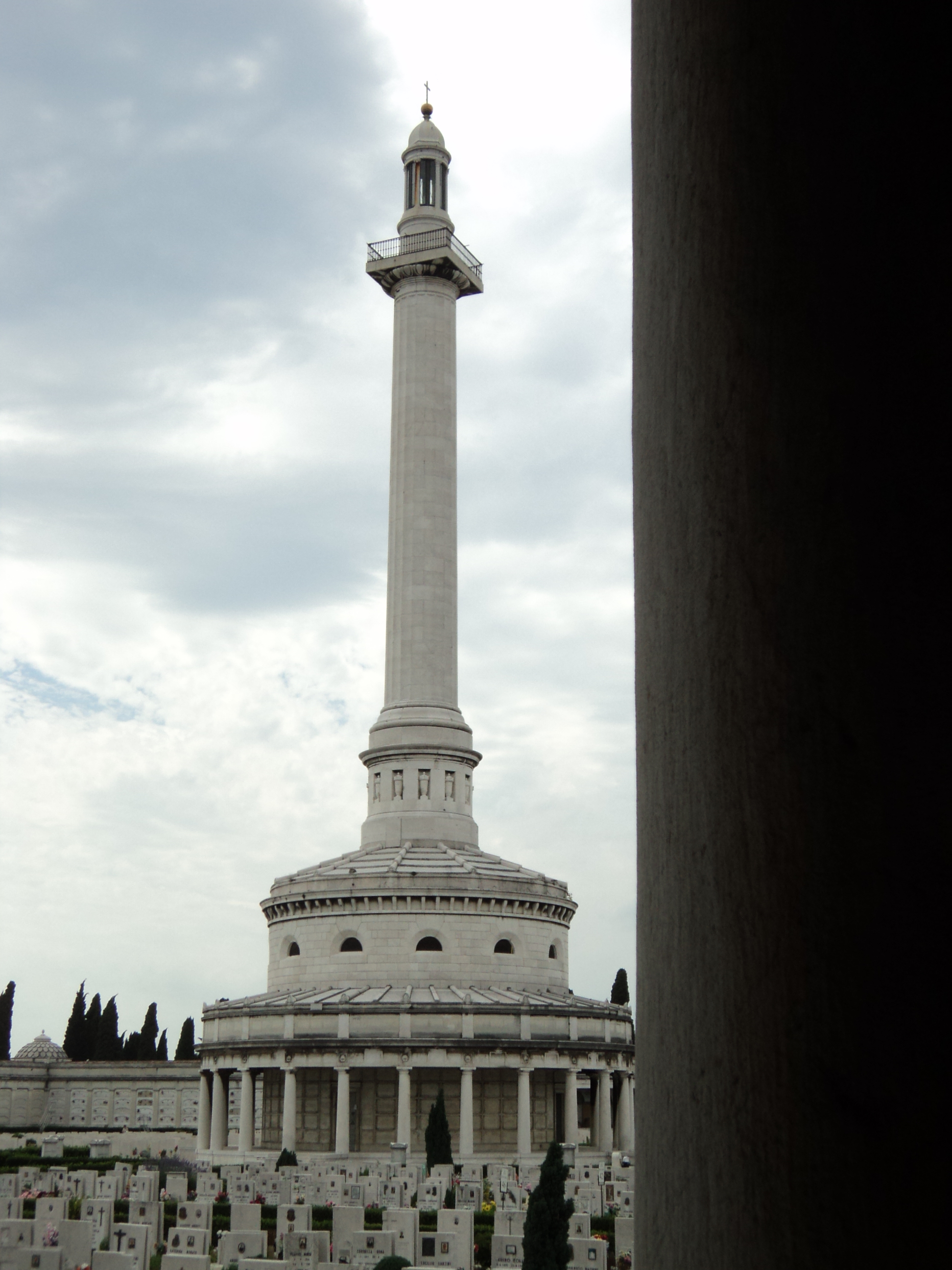 Cimitero Monumentale di Brescia, torre-faro